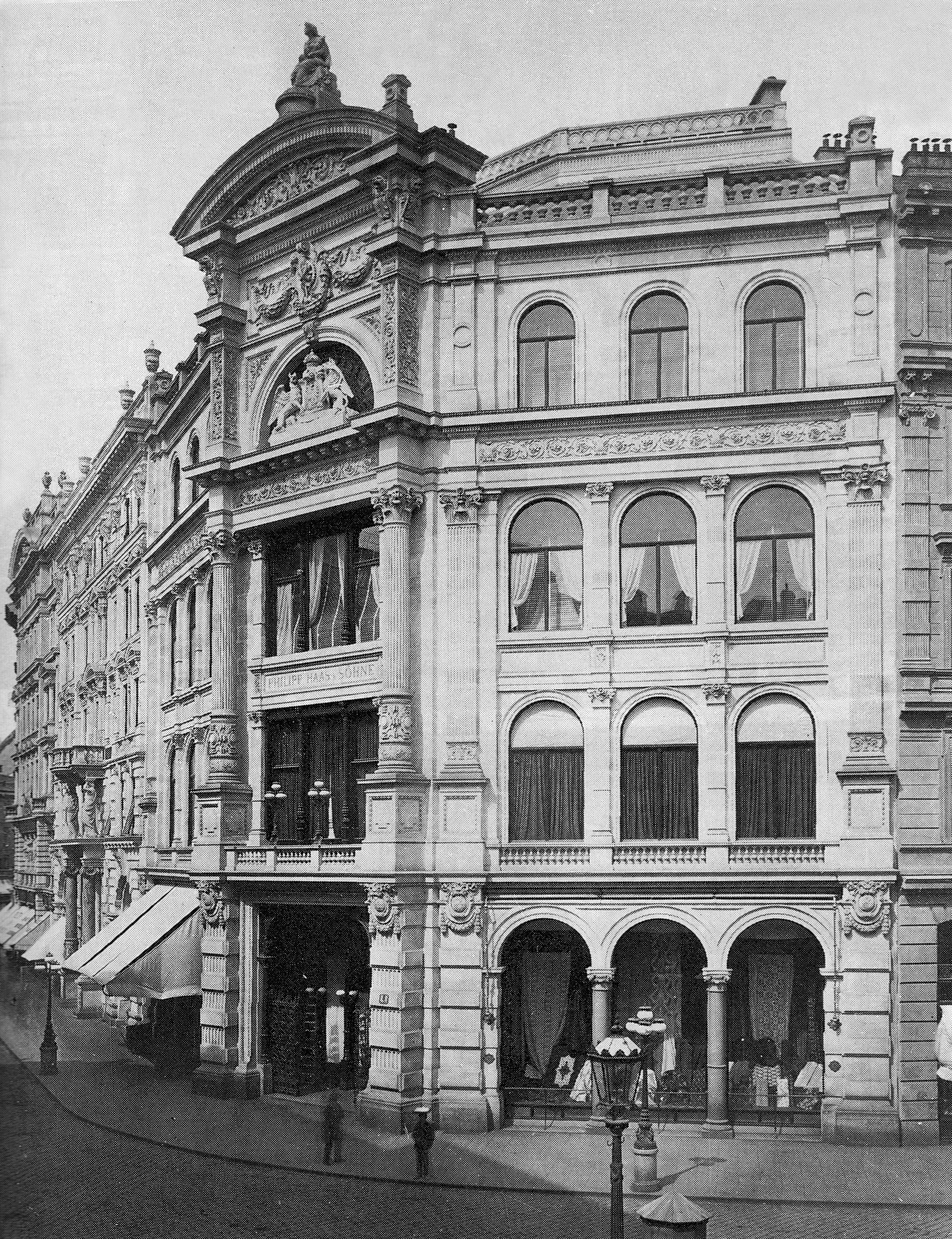 Warenhaus "Philipp Haas & Söhne" am Stephansplatz in Wien, Ende 19. Jahrhundert